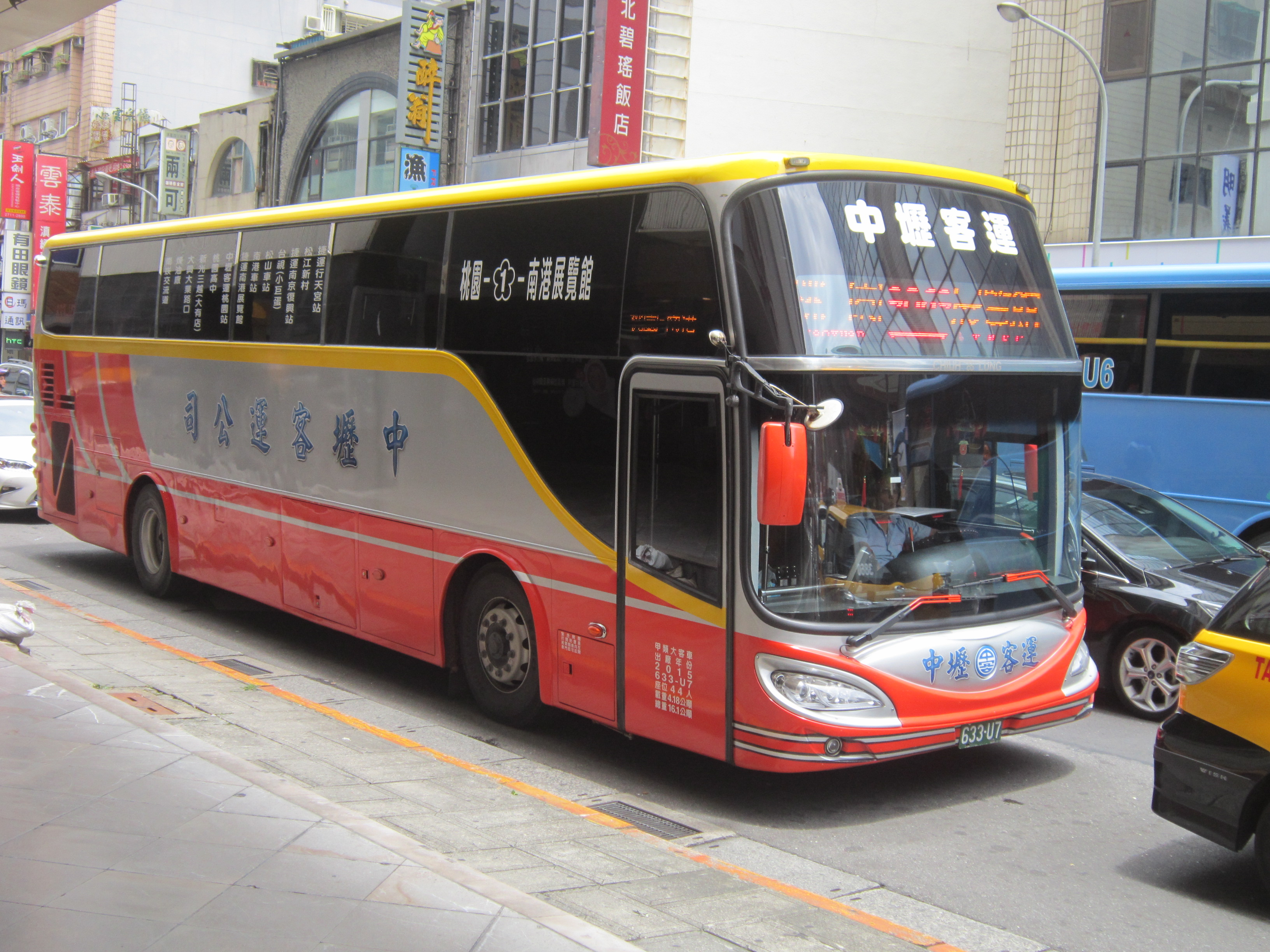 中文（台灣）: 中壢客運2015年Fuso RM11FN2XC大客車633-U7。